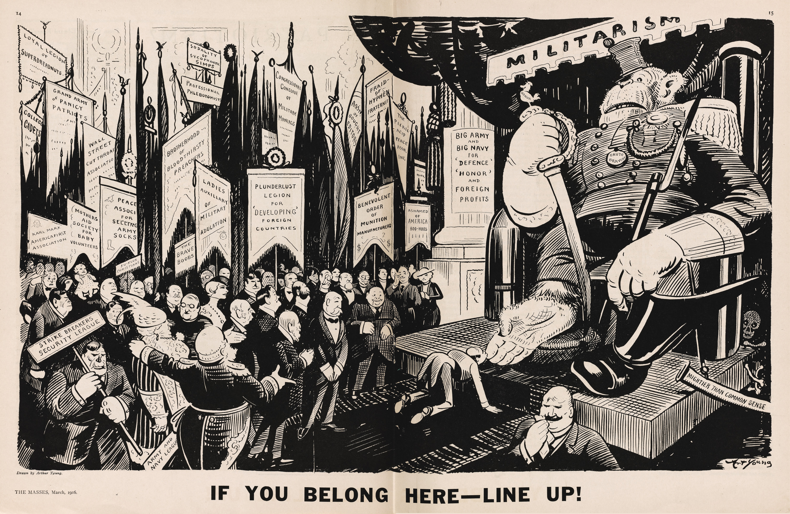 «If you belong here — Line up!», en el número de marzo de 1916 de The Masses.